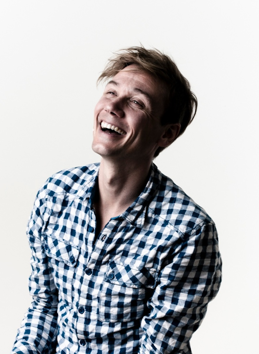 (c) Andrea Peller